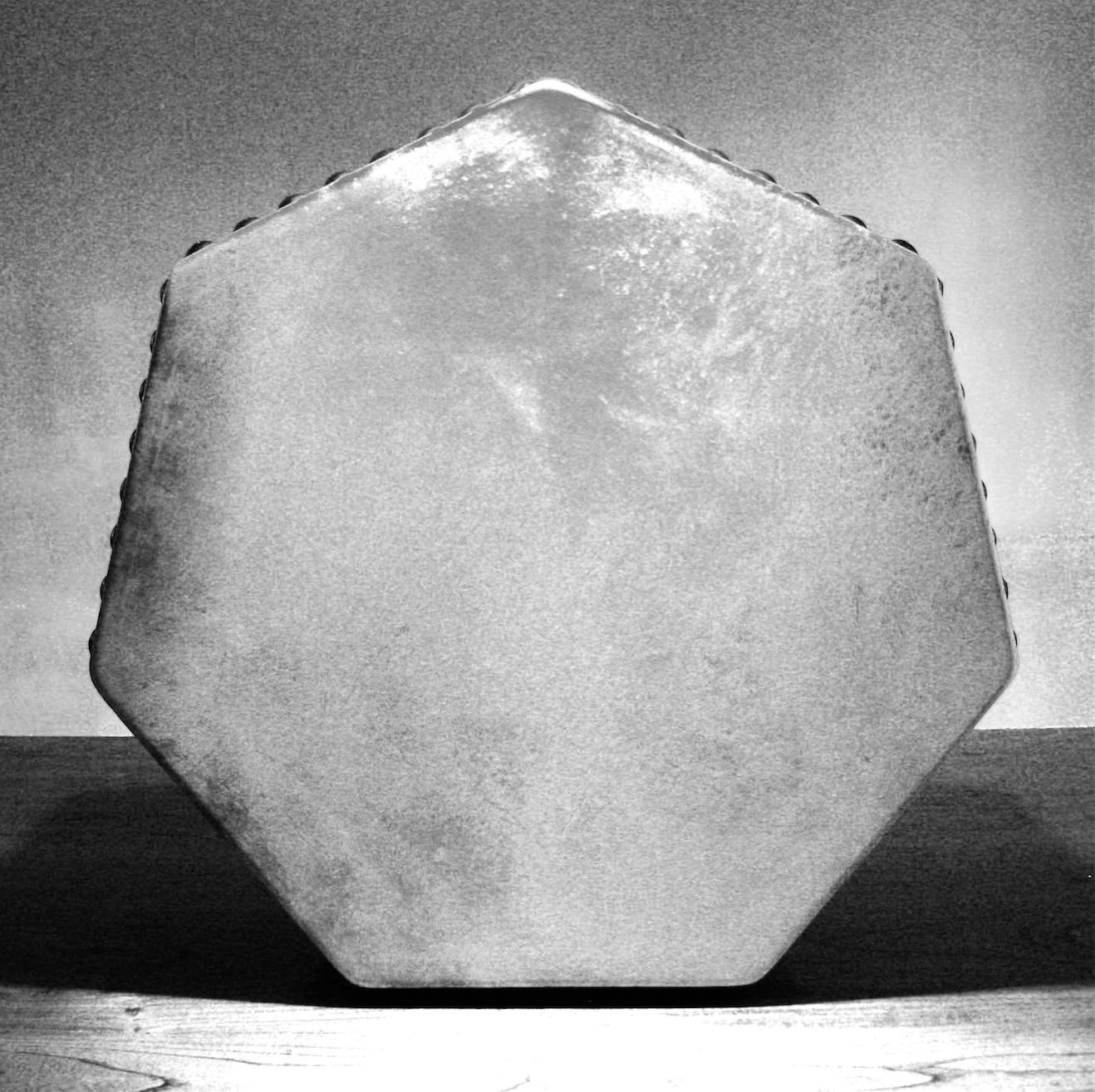 He-drum